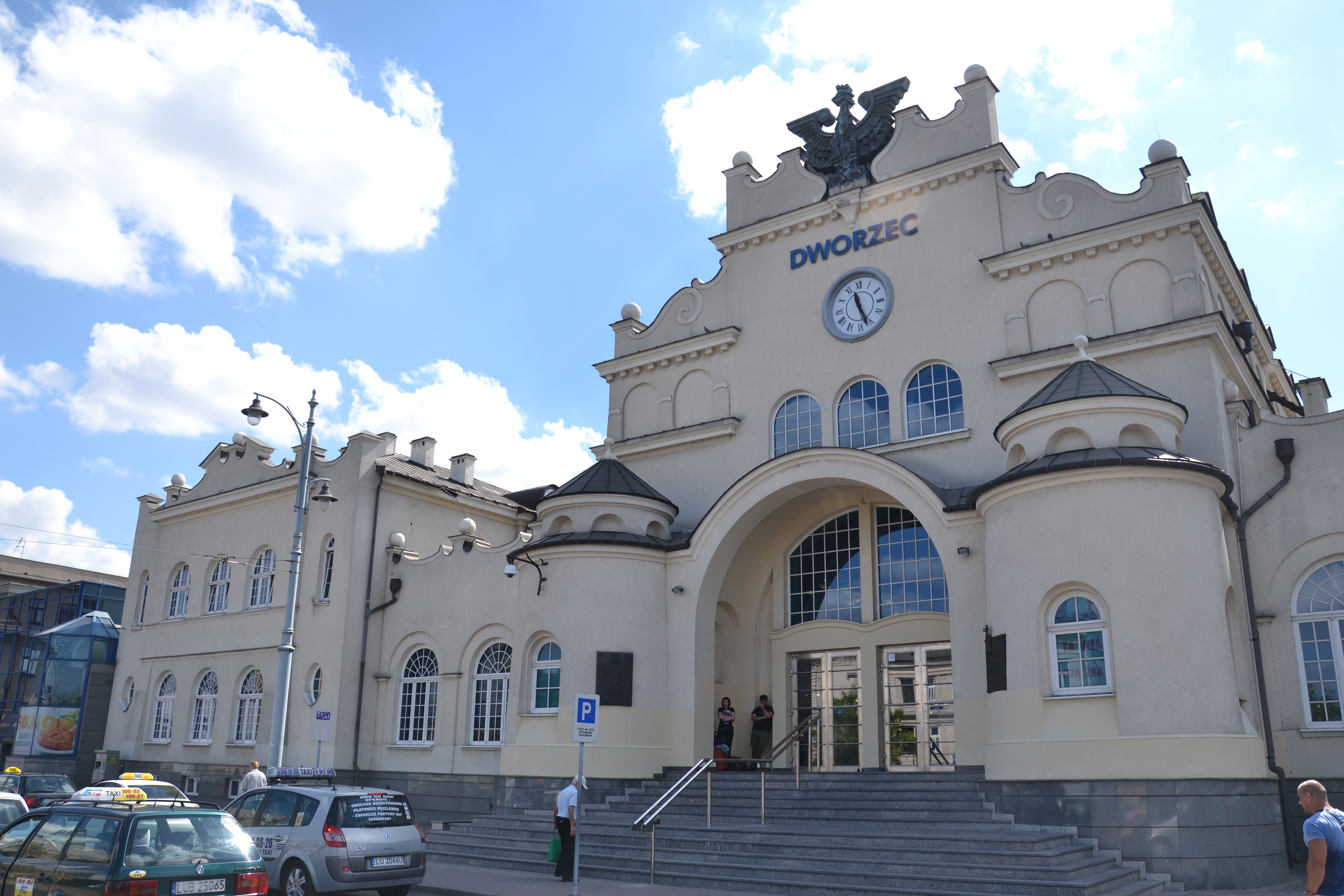 Widok dworca kolejowego w Lublinie od strony miasta This photo was taken during Railway Wikiexpedition 2015 set up by Wikimedia Polska Association in cooperation with Fundacja Grupy PKP. You can see all photographs in category Wikiekspedycja kolejowa 2015.